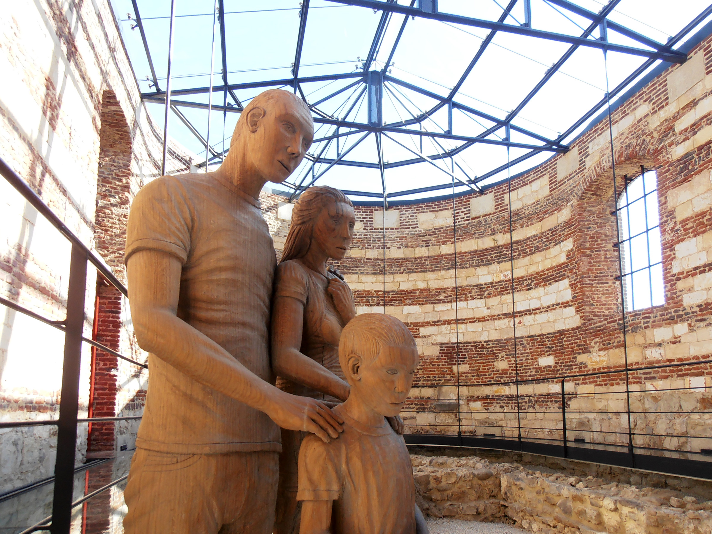 Voormalige Sint-Rochuskerk in Ulbeek (gemeente Wellen).Gerestaureerd en gerenoveerd tot ovedrekte begraafplaats. Vlaamse monumentenprijs 2012. Met glas overdekt koor en eikenhouten beeld.